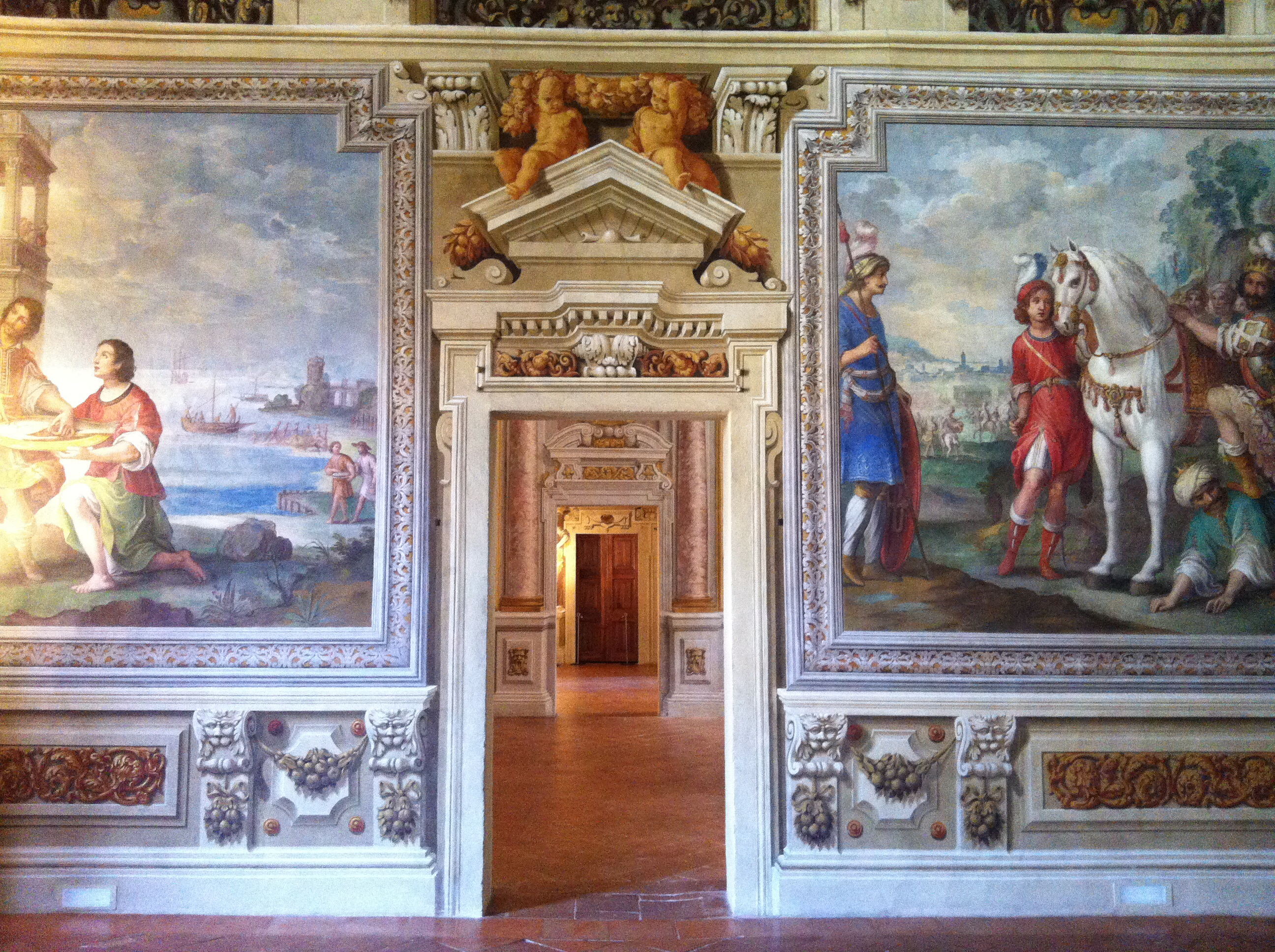 Palazzo Ducale - MIBAC This is a photo of a monument which is part of cultural heritage of Italy.